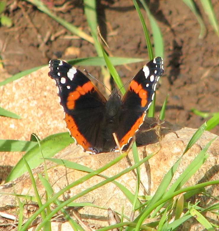 Green Paths, between Nesher - Yagur on Mount Carmel Israel. View from the path השביל הירוק בין העיר נשר וקיבוץ יגור, על הצלע הצפונית של הר הכרמל. מראות על השביל פרפר נימפית הסרפד